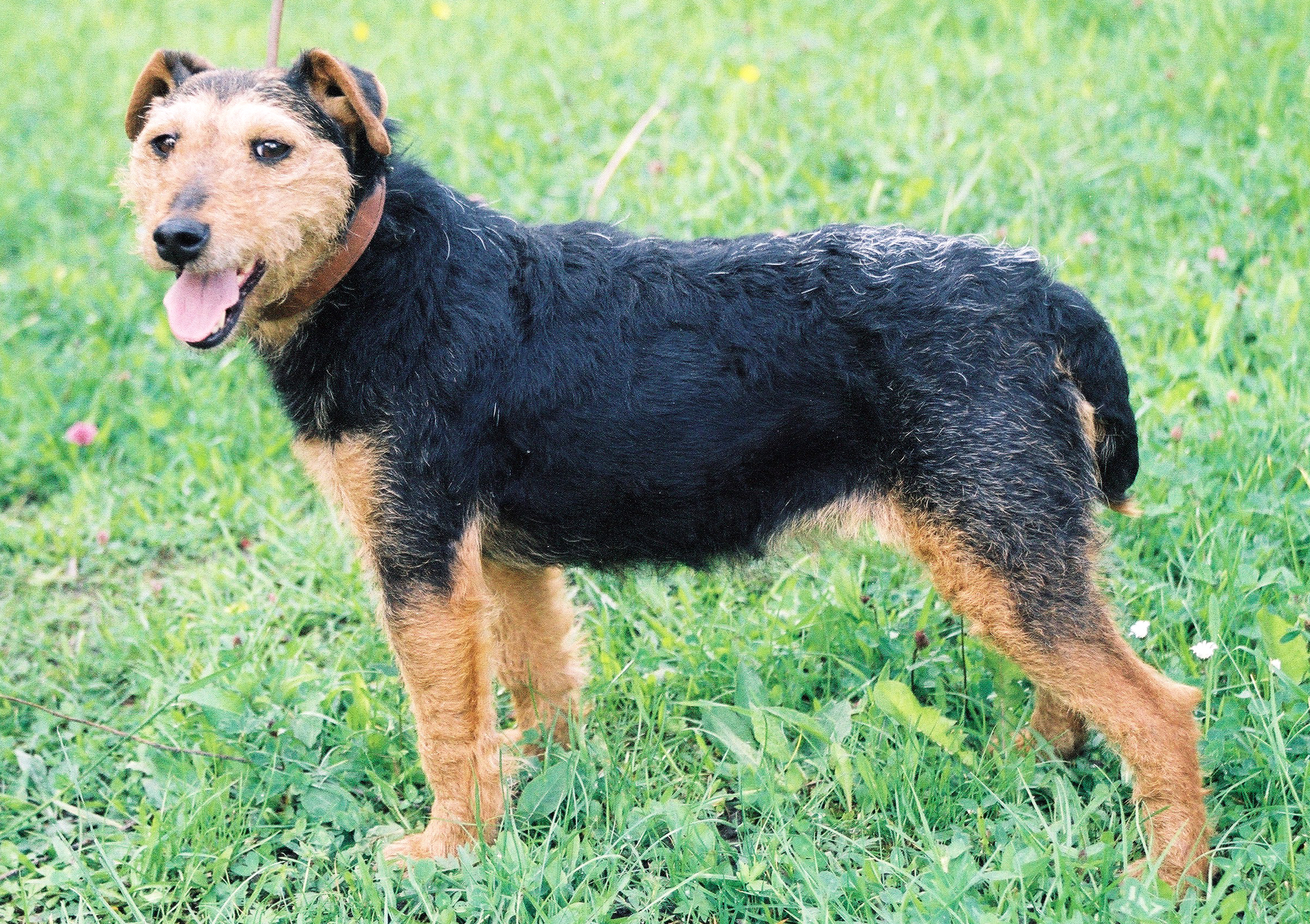 Terier_niemiecki - właściciel Danuta Walisko, hodowla w Koszęcinie